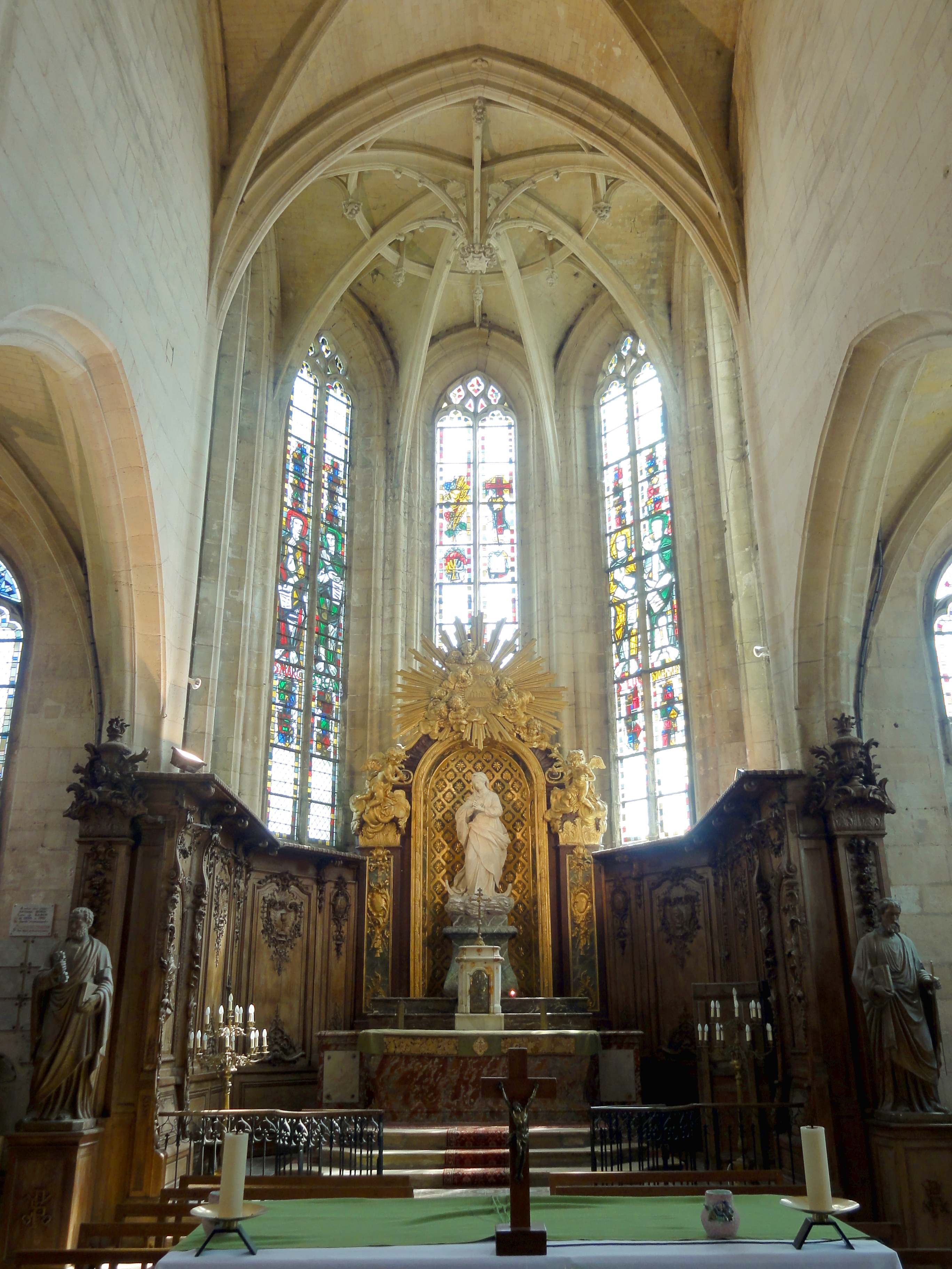 Intérieur de l'église (voir titre).